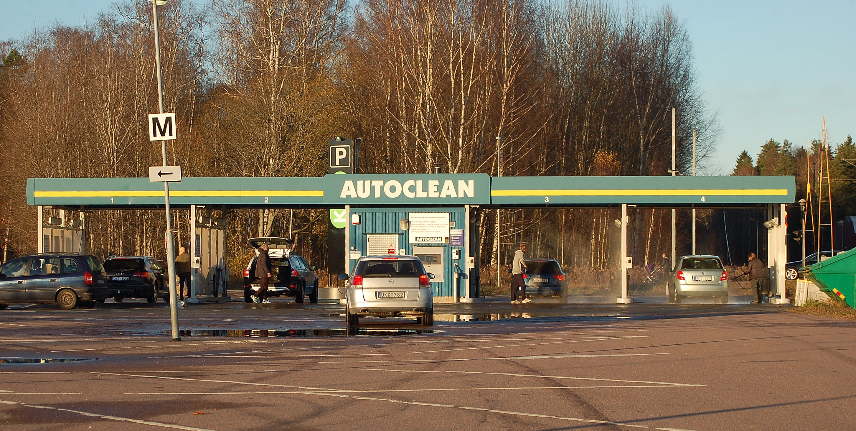 Autoclean Våxnäs, Karlstad.